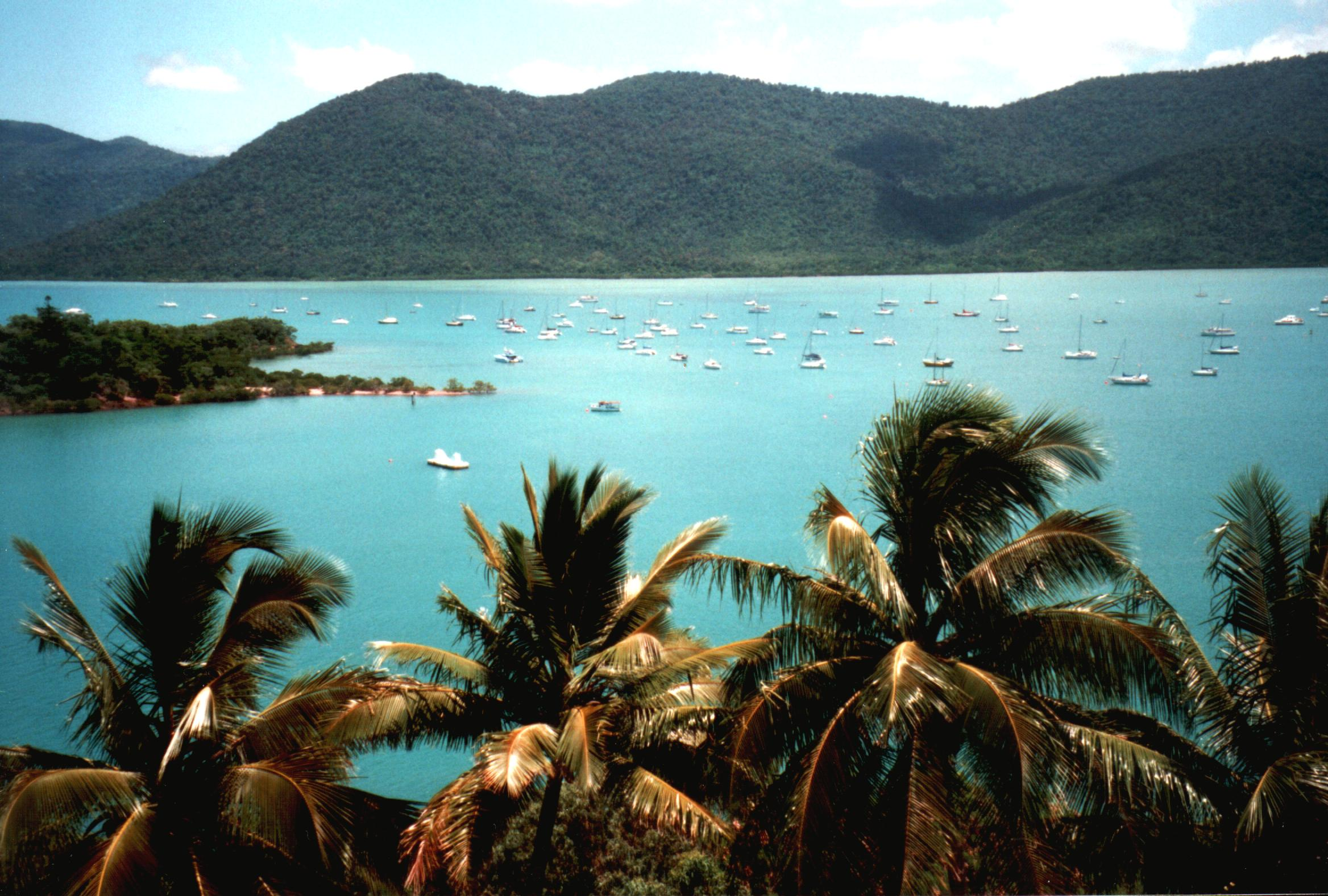 Shute Harbour, Whitsunday Islands, Queensland